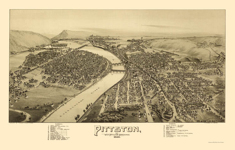 Pittston in 1892